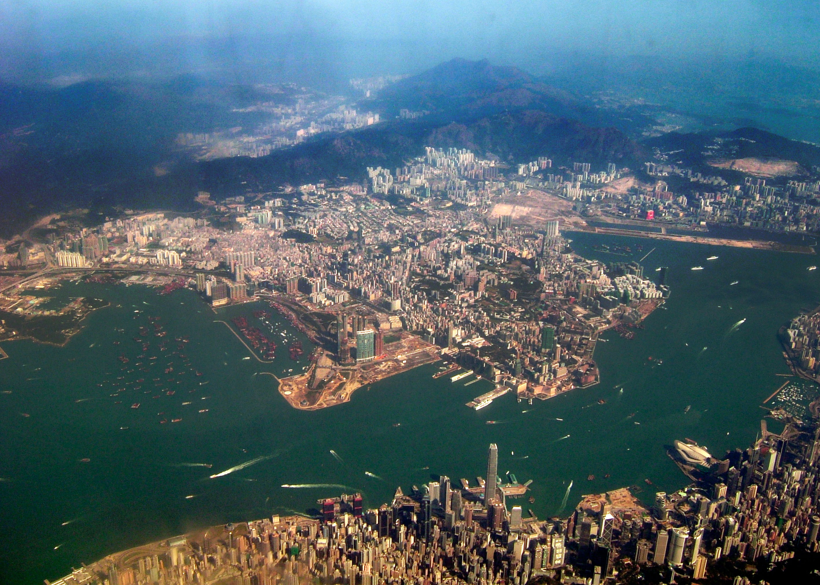 HK Kowloon View in 2006